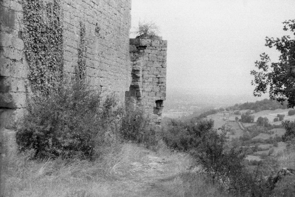 Ruines du château de Taillefer à Gintrac (Lot).